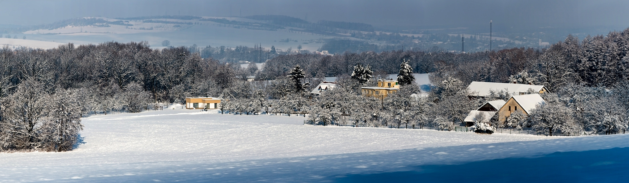 Krnalovice v zimě